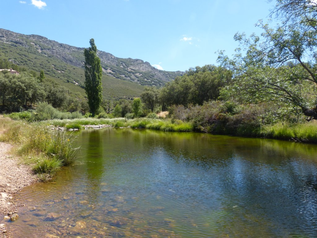 río Pusa